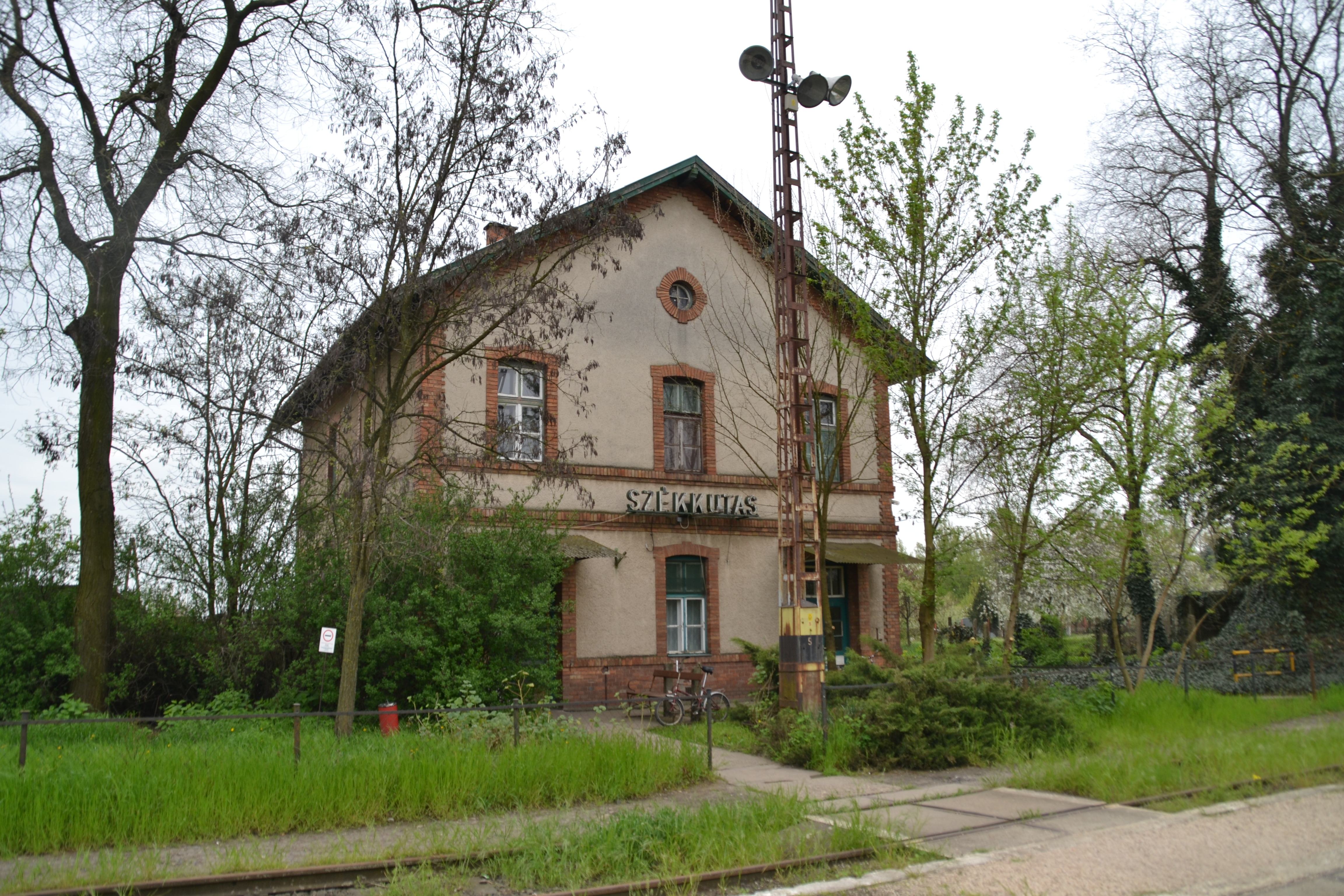 Székkutas vasútállomása